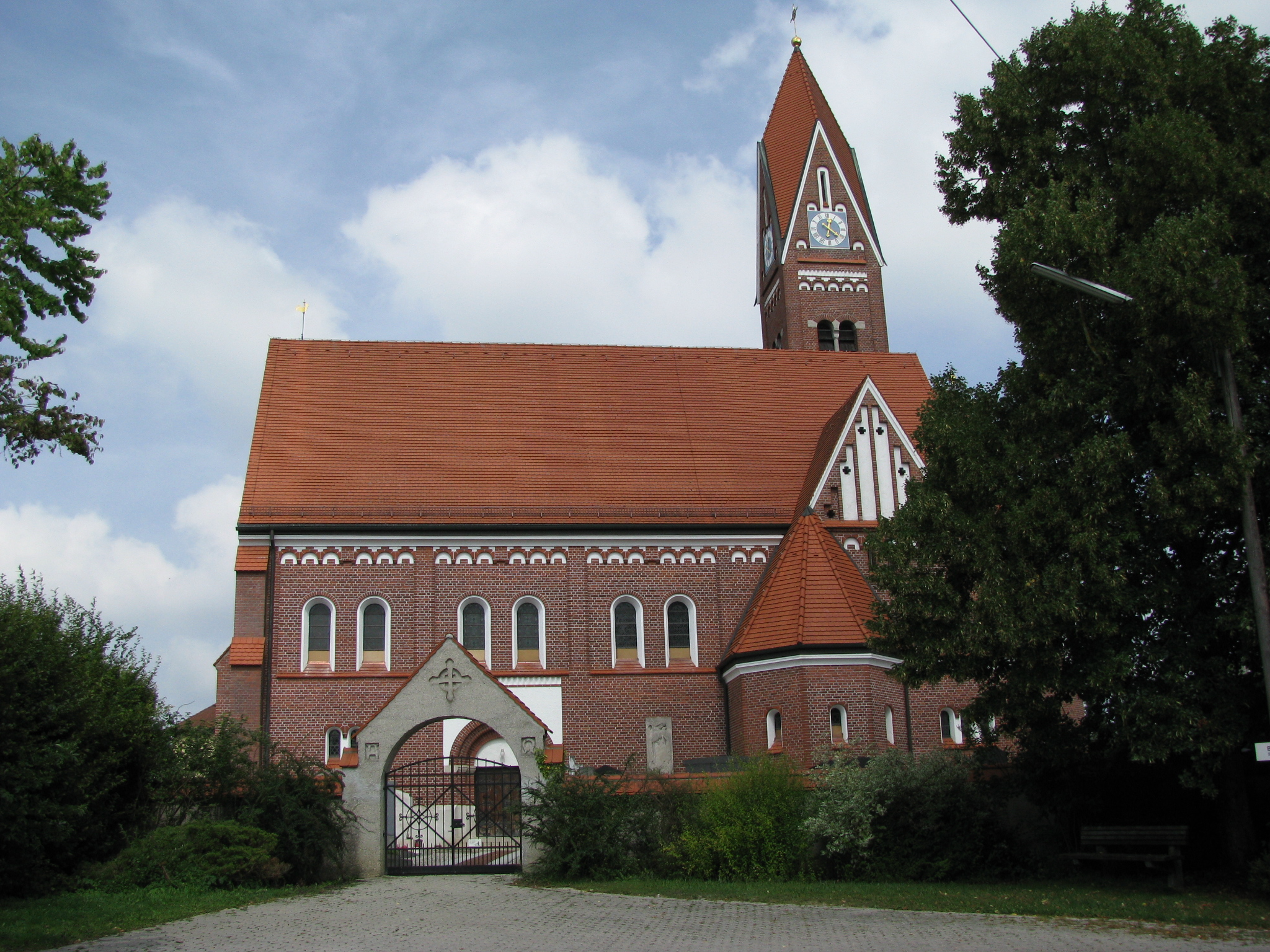 Pfarrkirche St. Georg (Sünzhausen), Freising, Ansicht von Süden